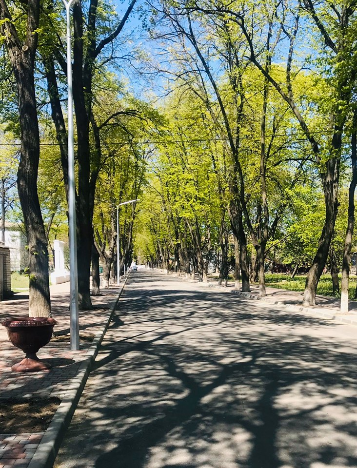 проспект Шкільний (вид зі сторони вул. Станційна)